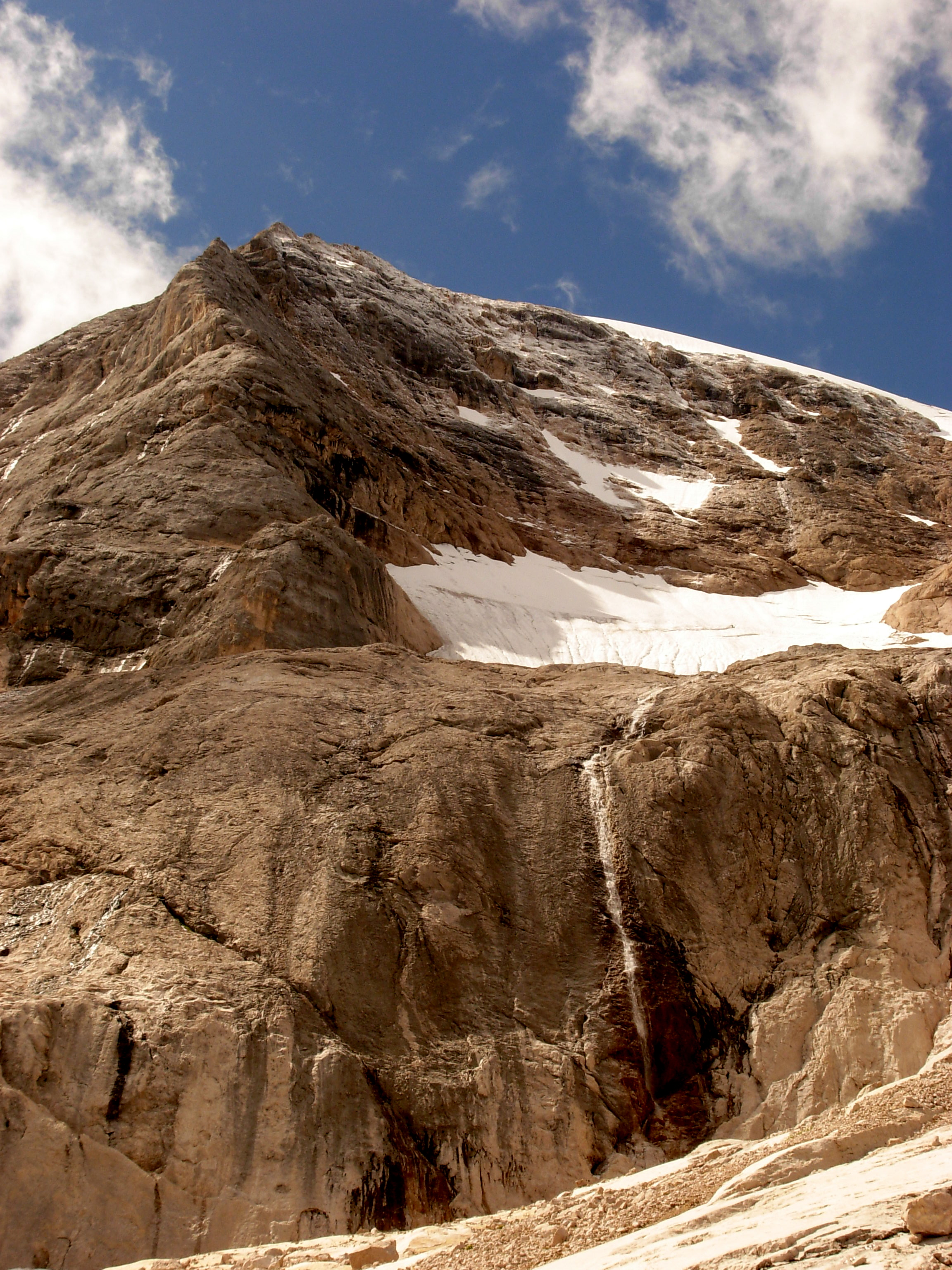 Marmolados prieškalnės - šiaurinė pusė